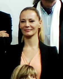 Tesoros vivos de la televisión